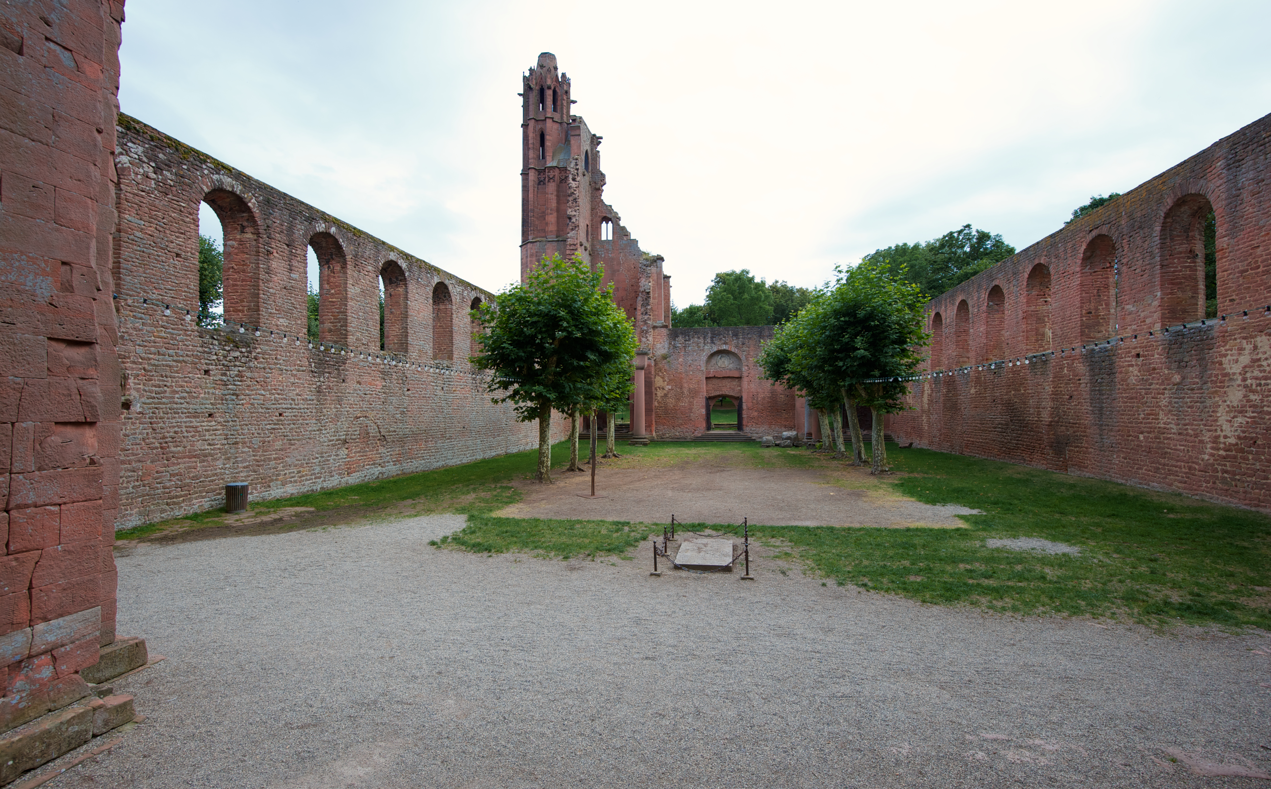 Ehemaliges Mittelschiff der Klosterruine Limburg mit dem Grab Gunhilds von Dänemark